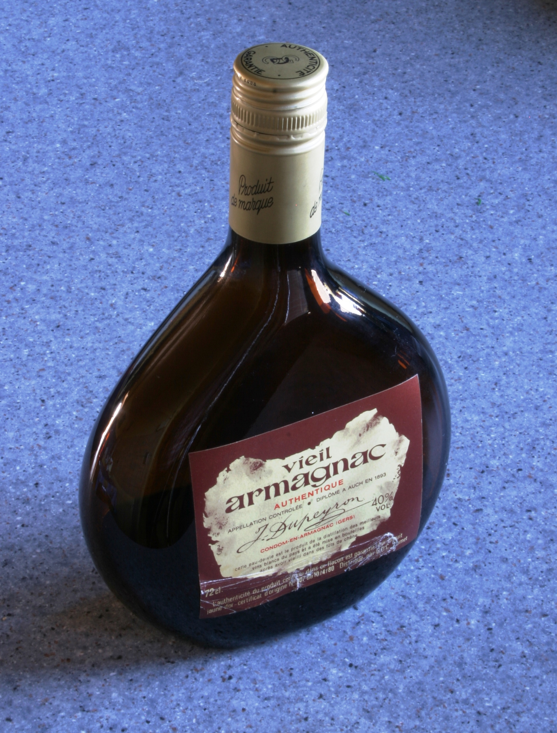 Eng Fläsch Armagnac